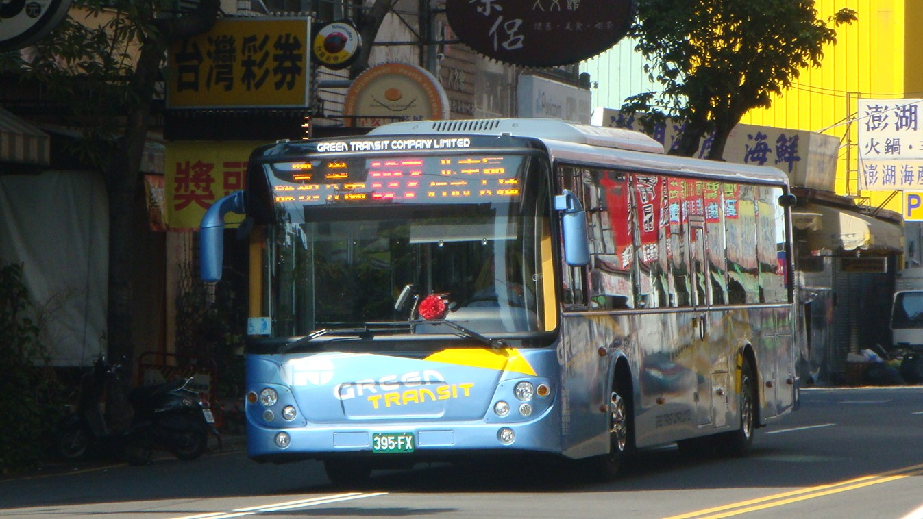 豐榮客運395-FX營運台中市公車127路